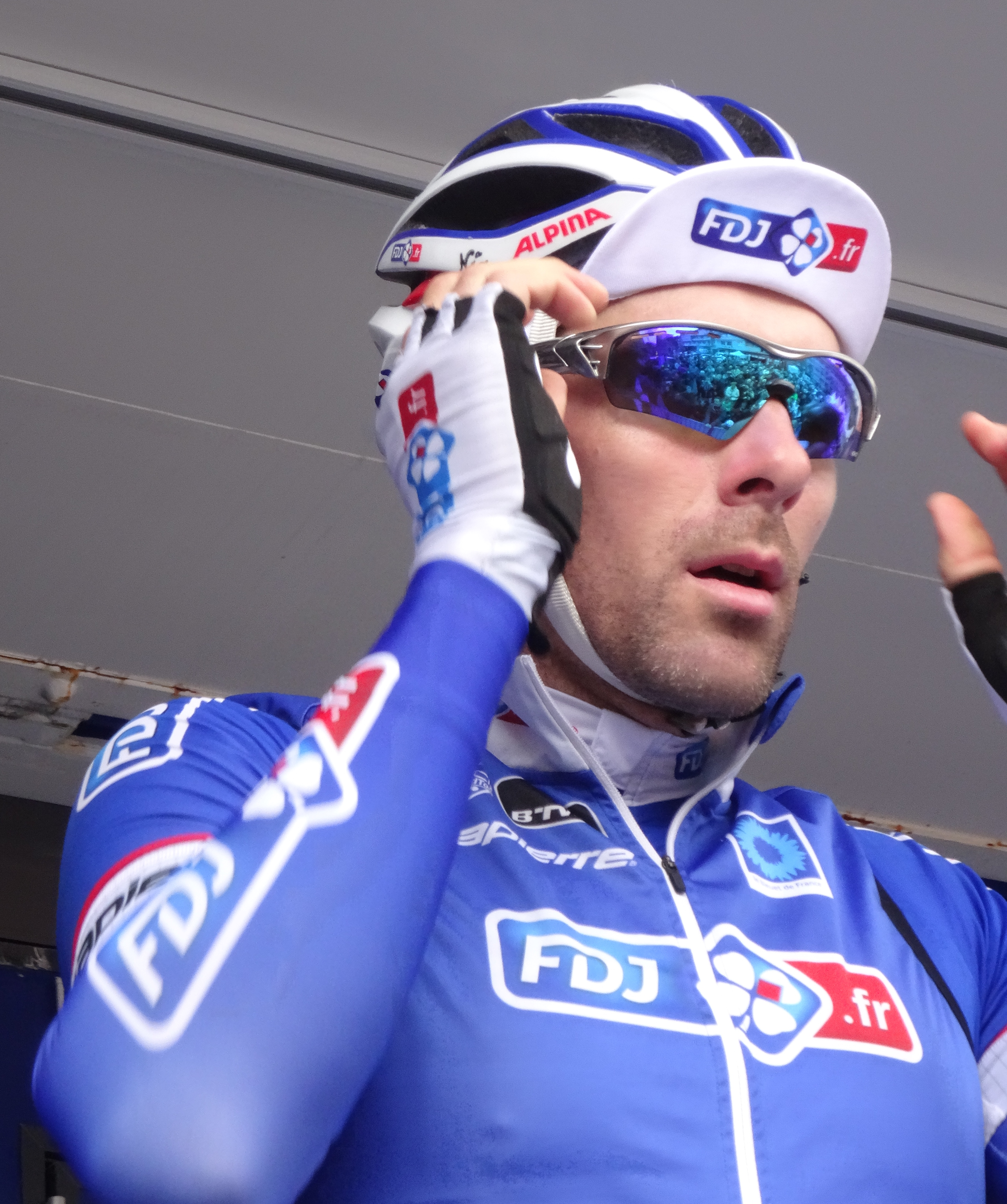 Reportage photographique réalisé le mercredi 7 mai 2014 au départ de la première étape de l'édition 2014 des Quatre jours de Dunkerque à Dunkerque, Nord, Nord-Pas-de-Calais, France. Depicted person: David Boucher Depicted team: FDJ.fr